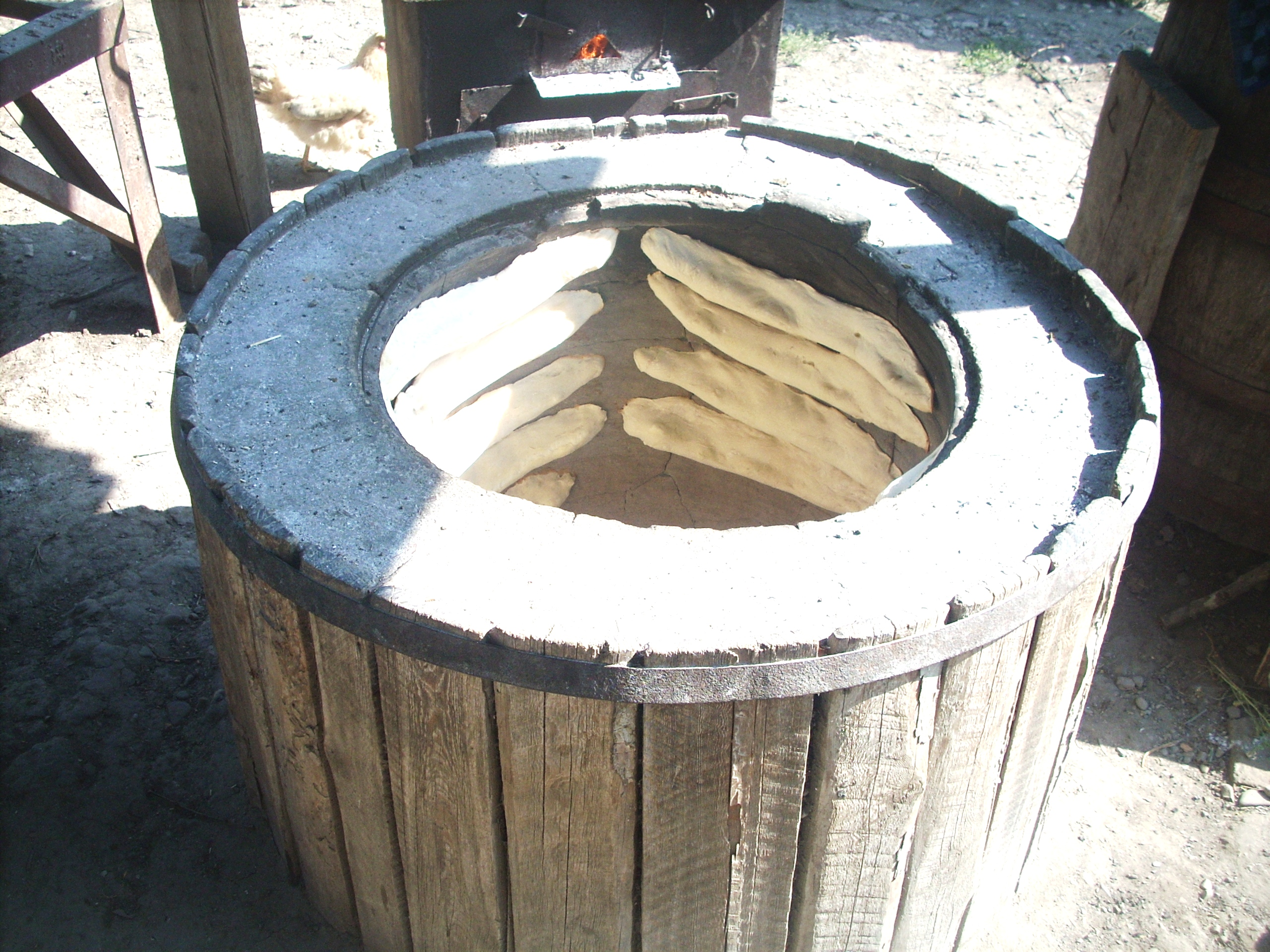 თონე